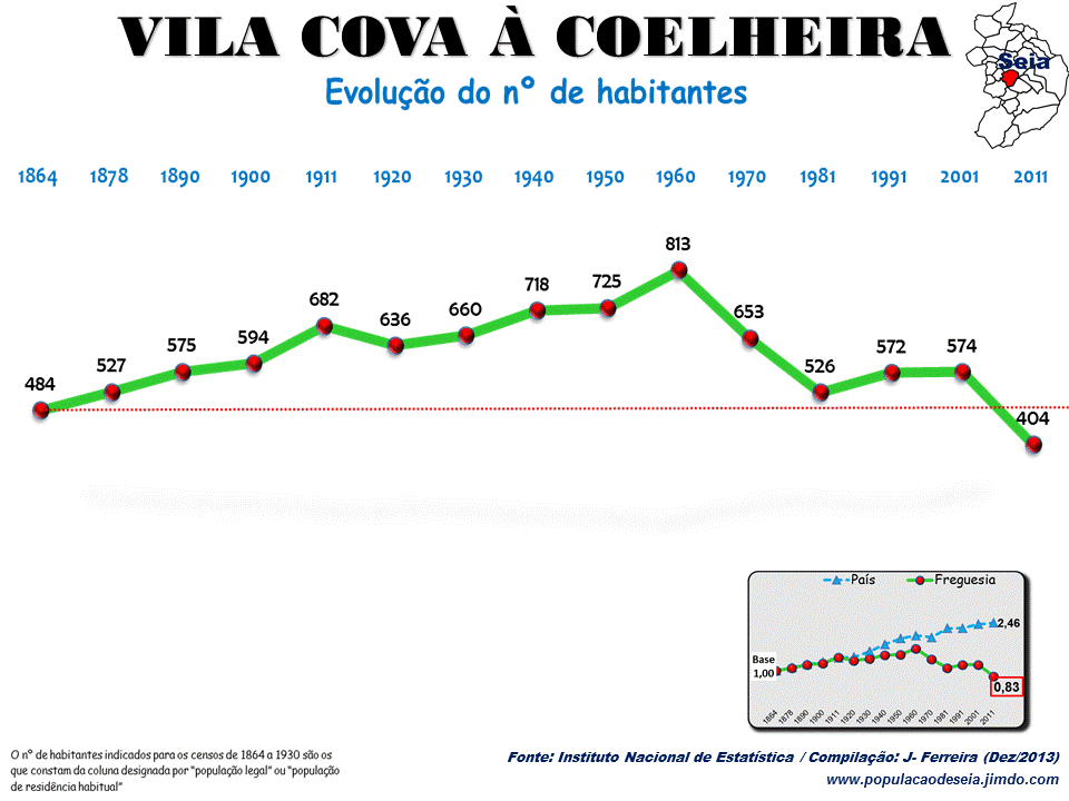 Evolução da População 1864 / 2011